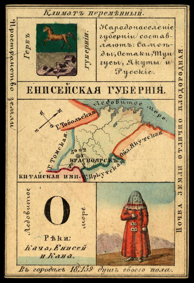 История России. Енисейская губерния на цветных карточках лото - популярной настольной игры XIX-начала XX вв.